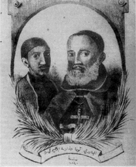 Dessin représentant le Père Tommaso et son domestique Ibrahim Amarah, disparus à Damas le 5 février 1840.